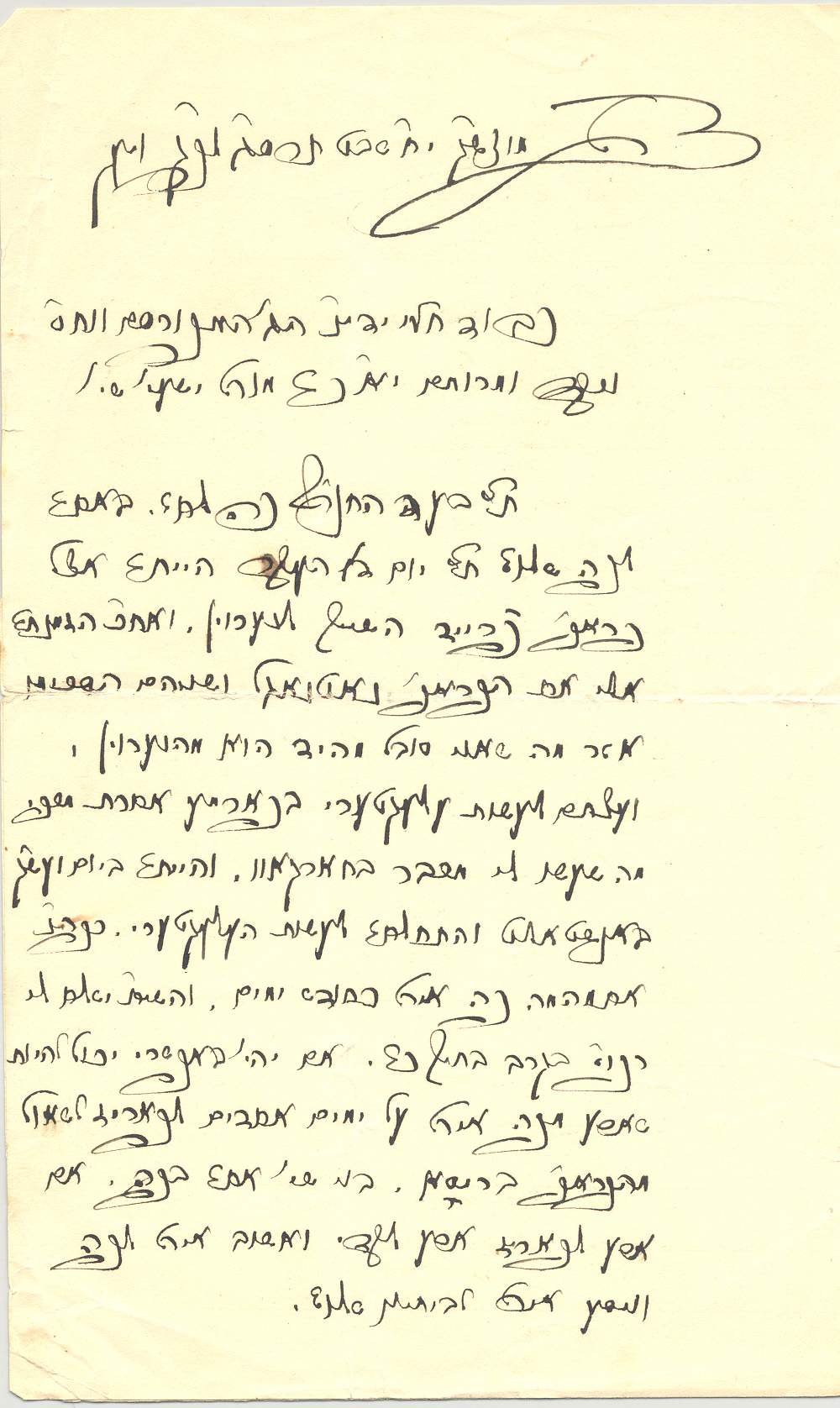 מכתב של אדמו"ר הרש"ב מתקופת ביקורו אצל זיגמונד פרויד